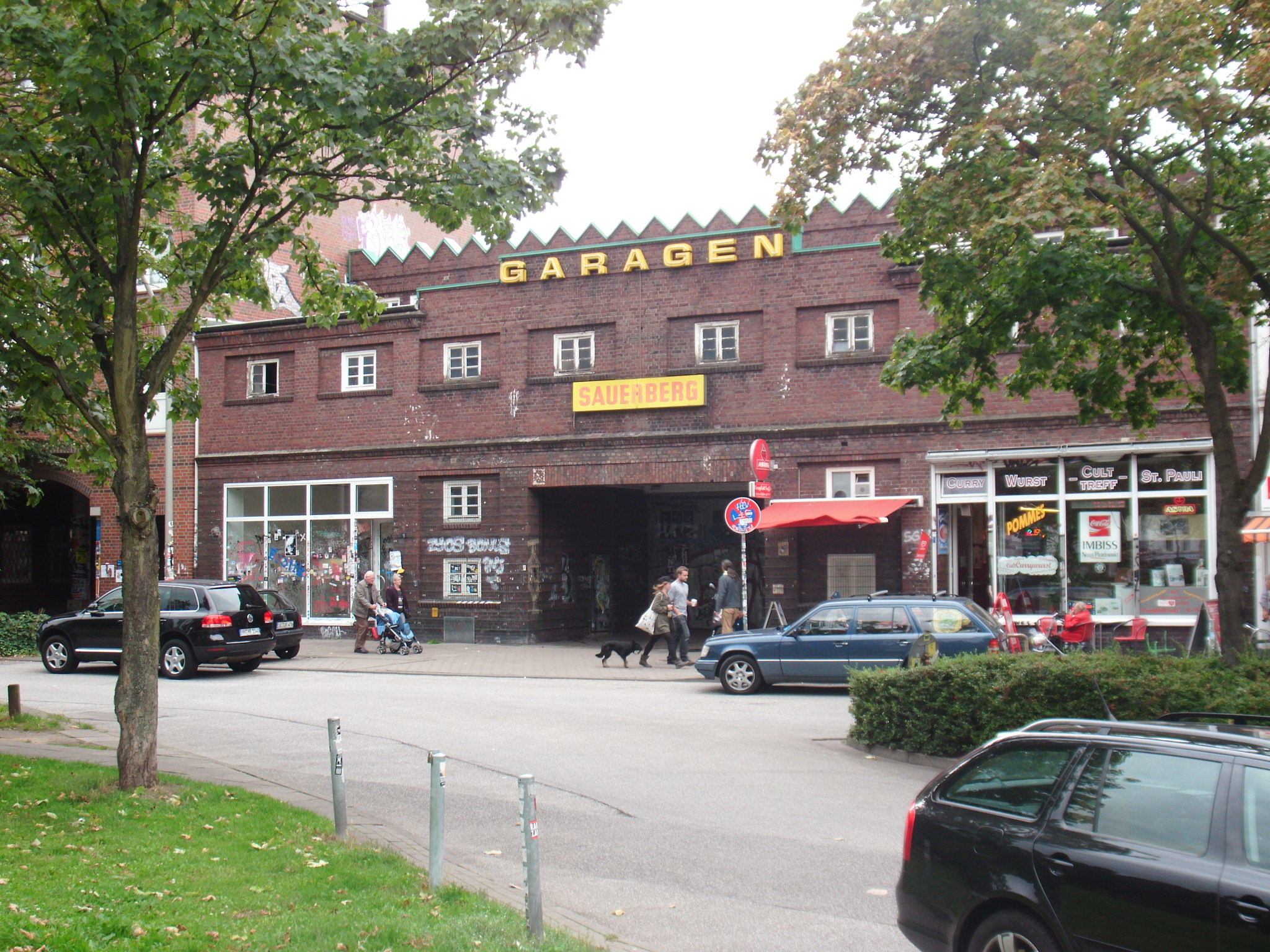 Garagengebäude einschließlich Rampe von 1926This is a photograph of an architectural monument.